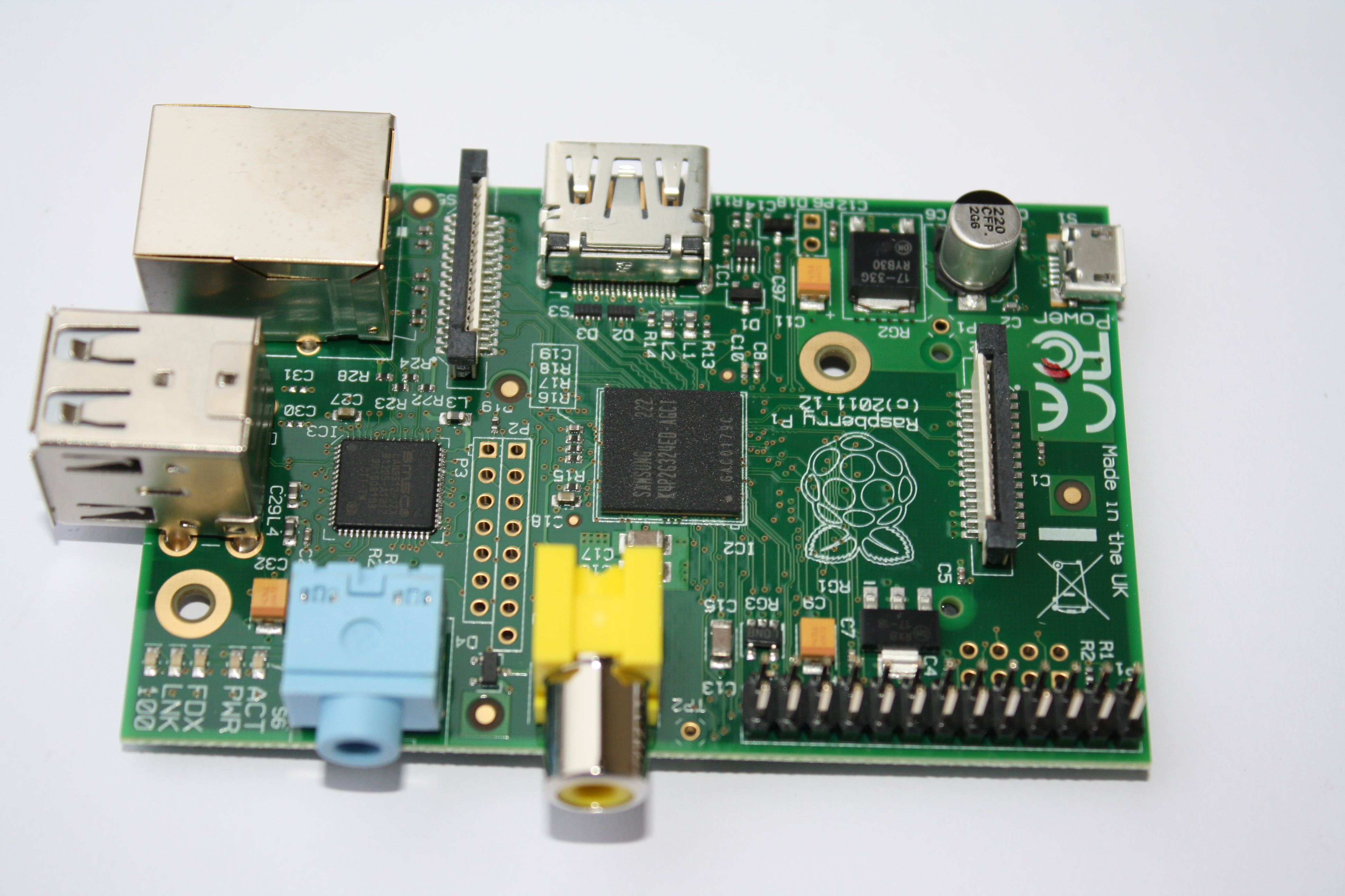 Rev. 2 des Raspberry Pi Model B - made in UK